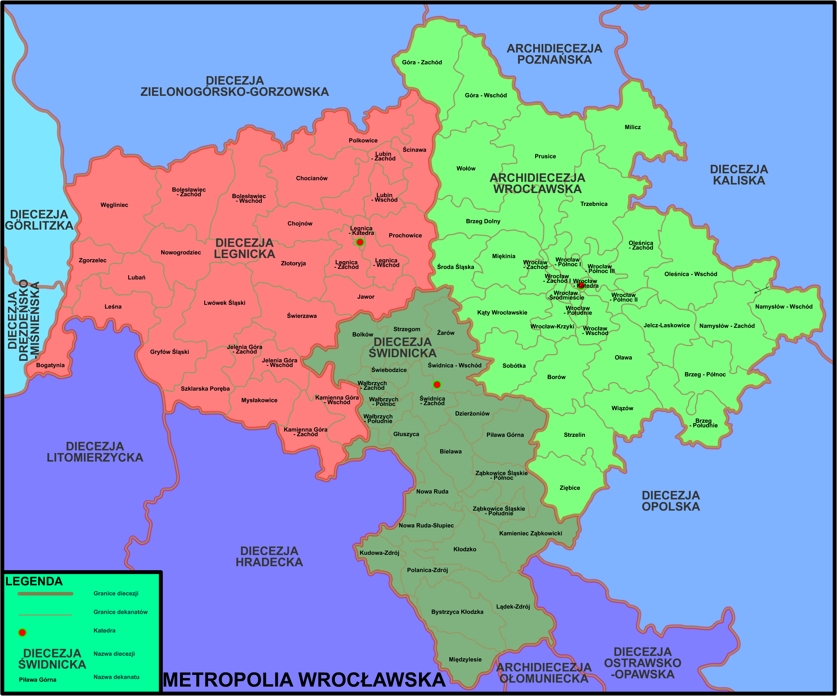 Mapa metropolii wrocławskiej z podziałem na dekanaty (06.2012) i zaznaczonymi wszystkimi diecezjami sąsiednimi (wraz z niemieckimi i czeskimi)